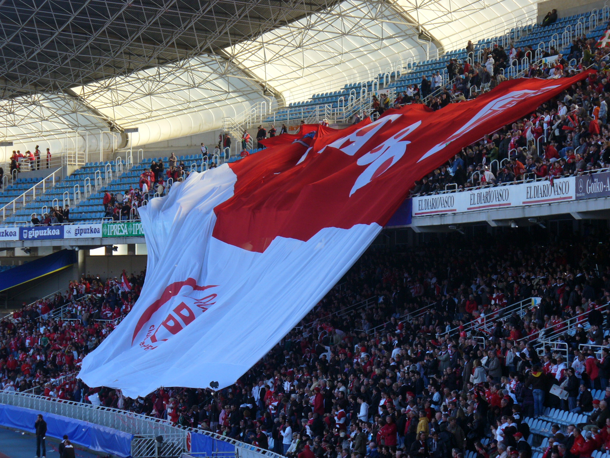 Bandera desplegada por los seguidores del BOPB durante el partido entre el Biarritz Olympique y el Stade Toulousain, disputado en Anoeta, San Sebastián